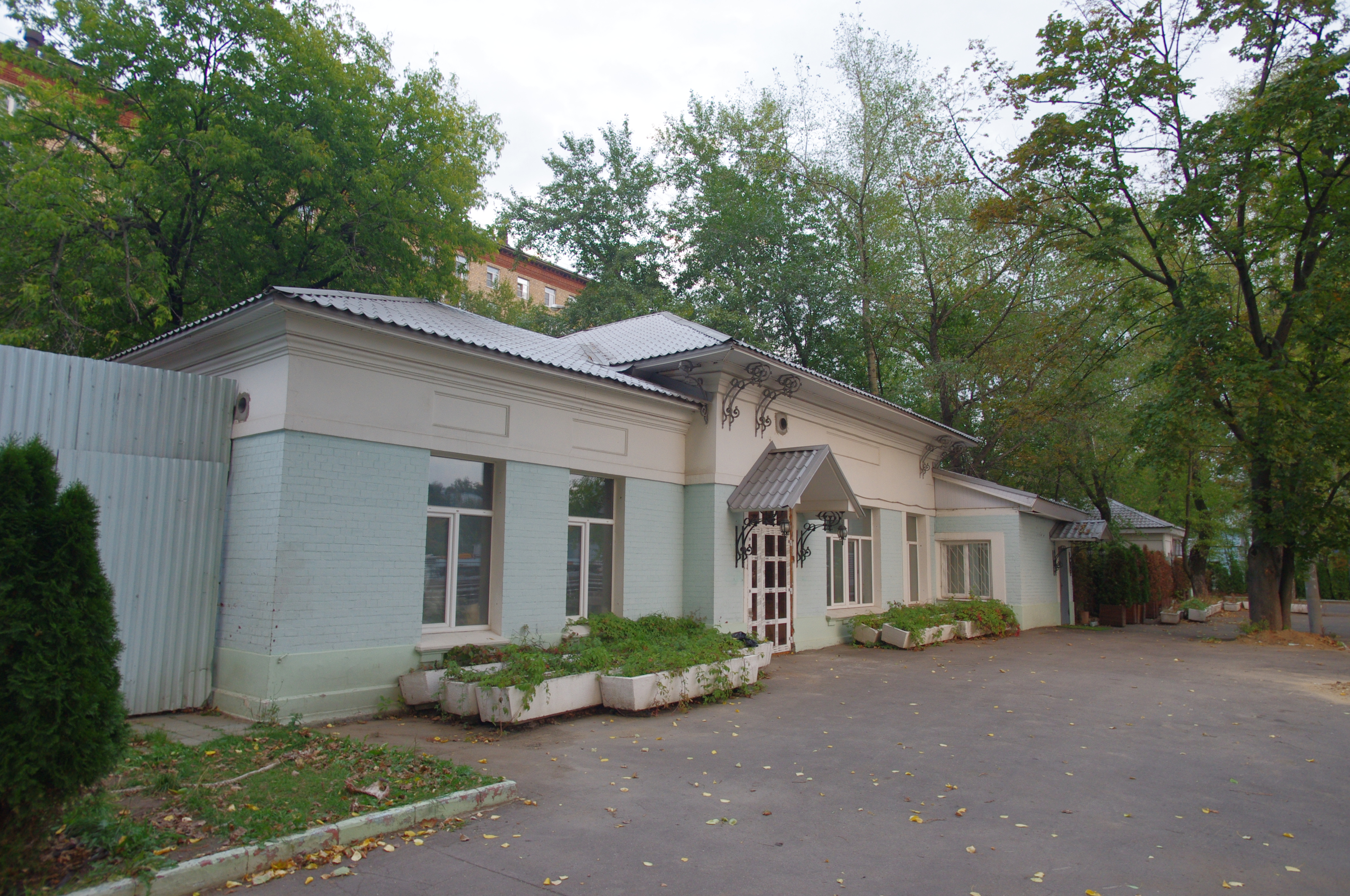 Станция Серебрянный Бор Serebryannyi Bor station